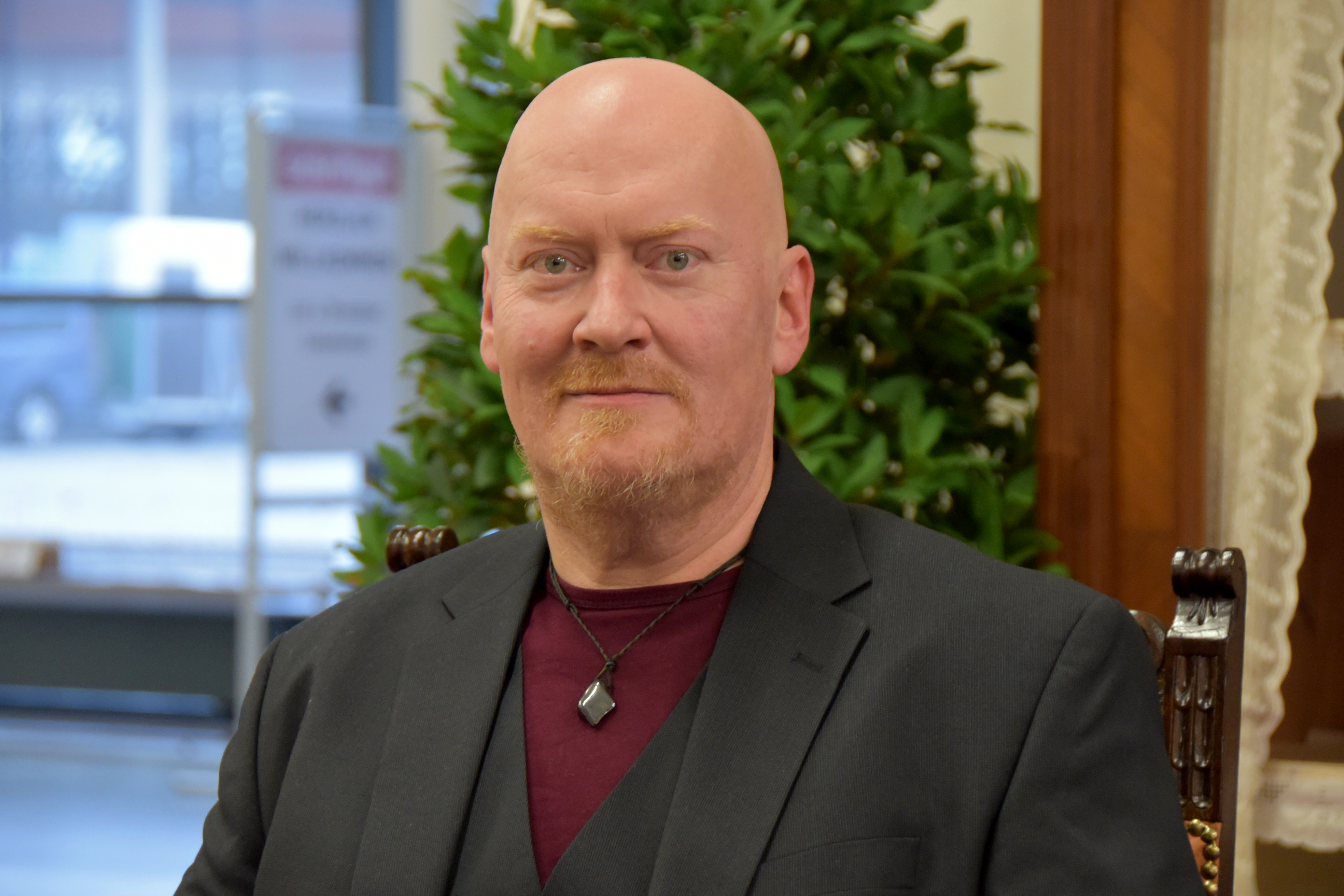 Ivo Pala auf der Messe Schriftgut 2015